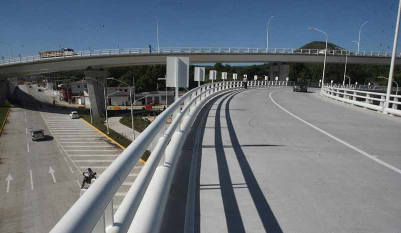 Autopistas y Pasos a desniveles de Managua